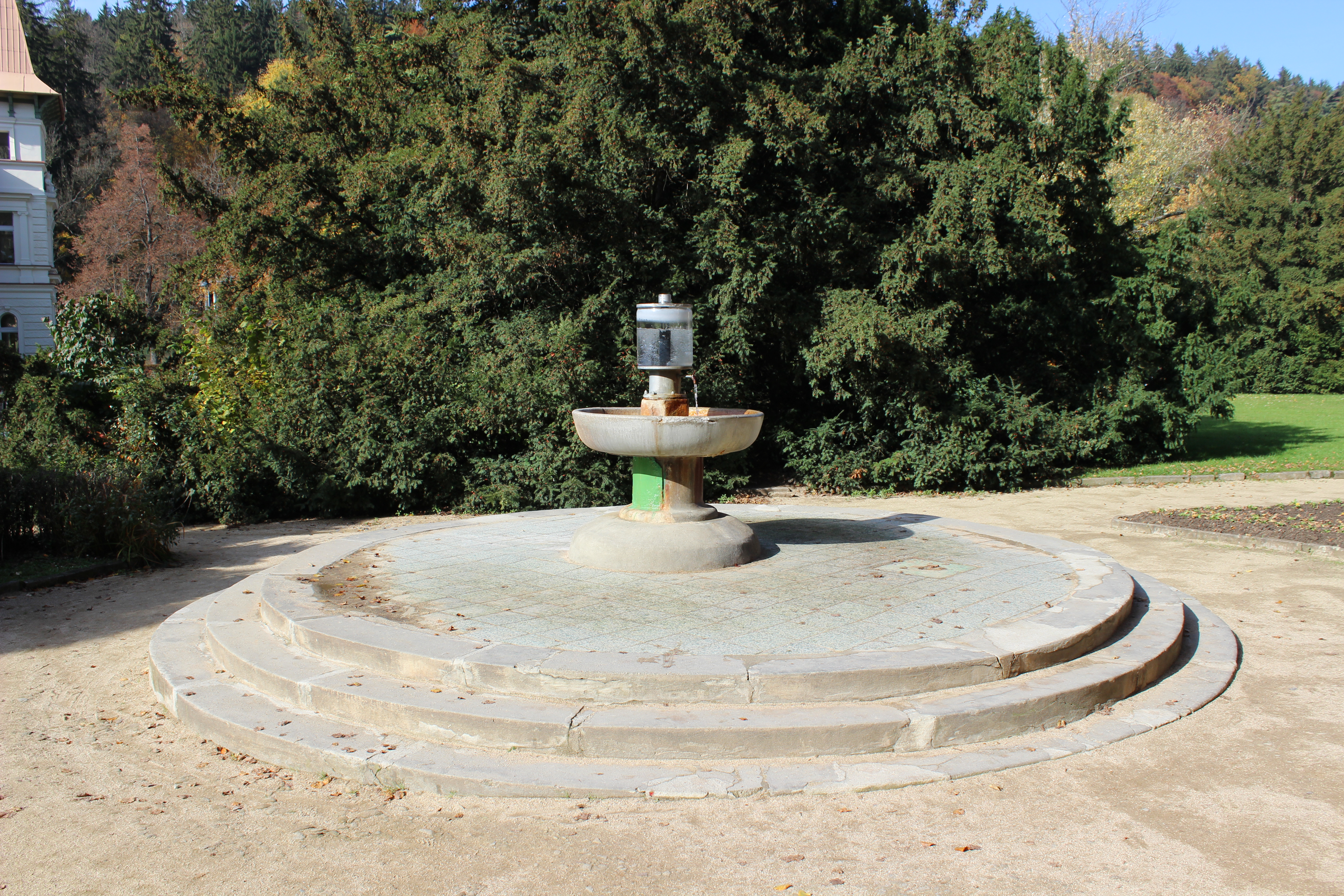 Luhačovický pramen doktora Šťastného.